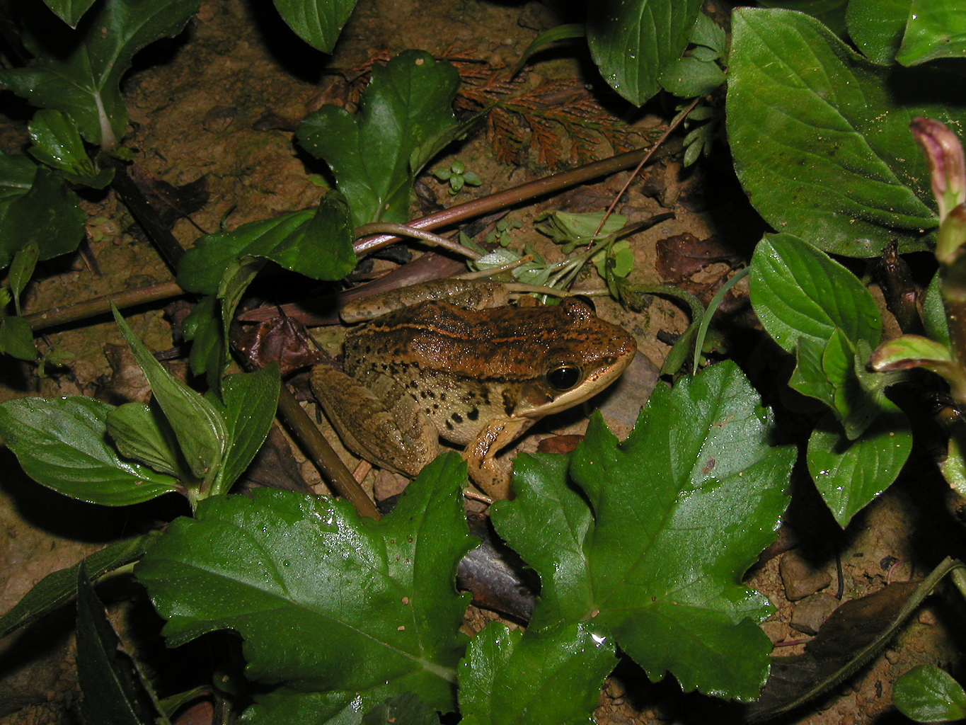 Rana adenopleura